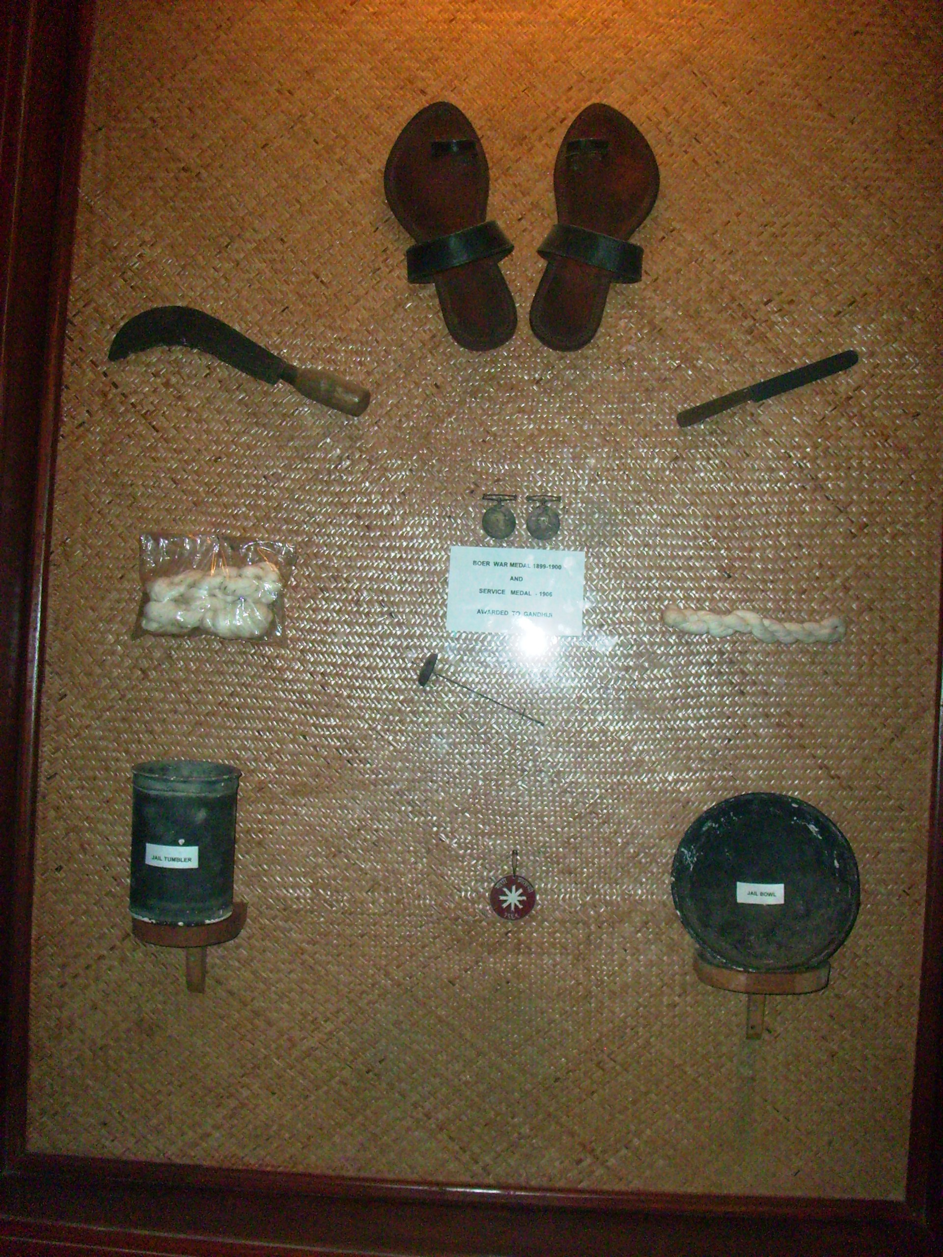 صور من متحف المهاتما غاندي في مومباي